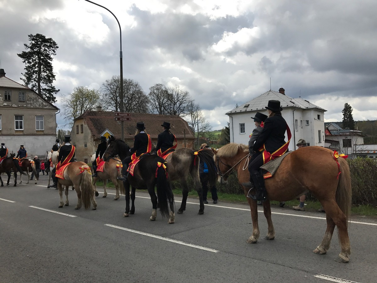 Velikonoční jízda na Velikonoční neděli 16. dubna 2017 v Mikulášovicích